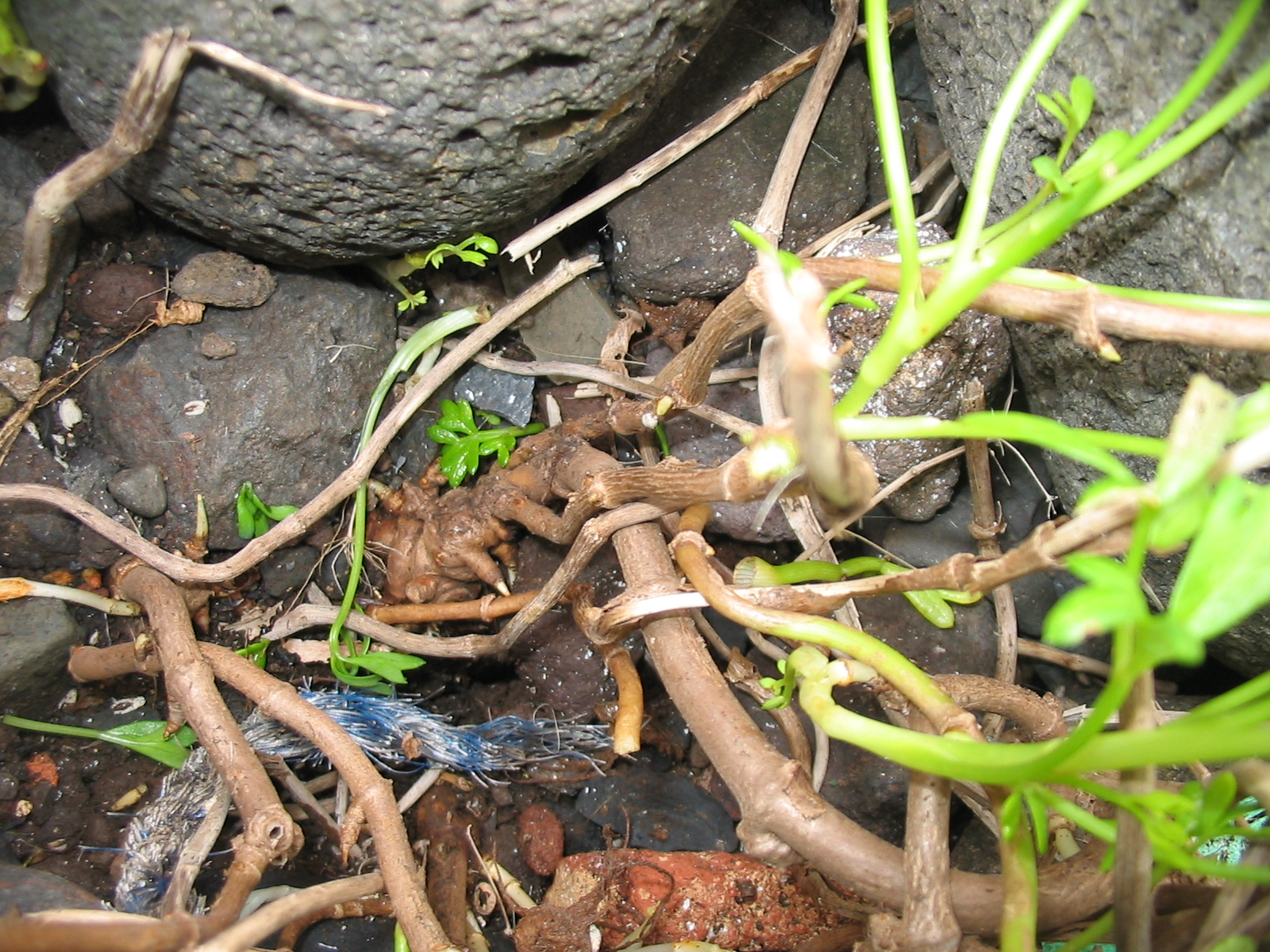 Dreiblättrige Knorpelmöhre (Ammi trifoliatum) - Base